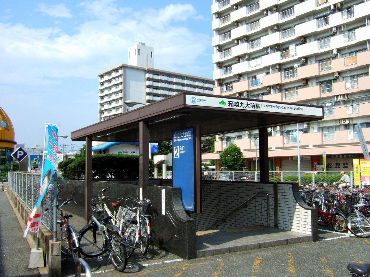 福岡市地下鉄箱崎九大前駅